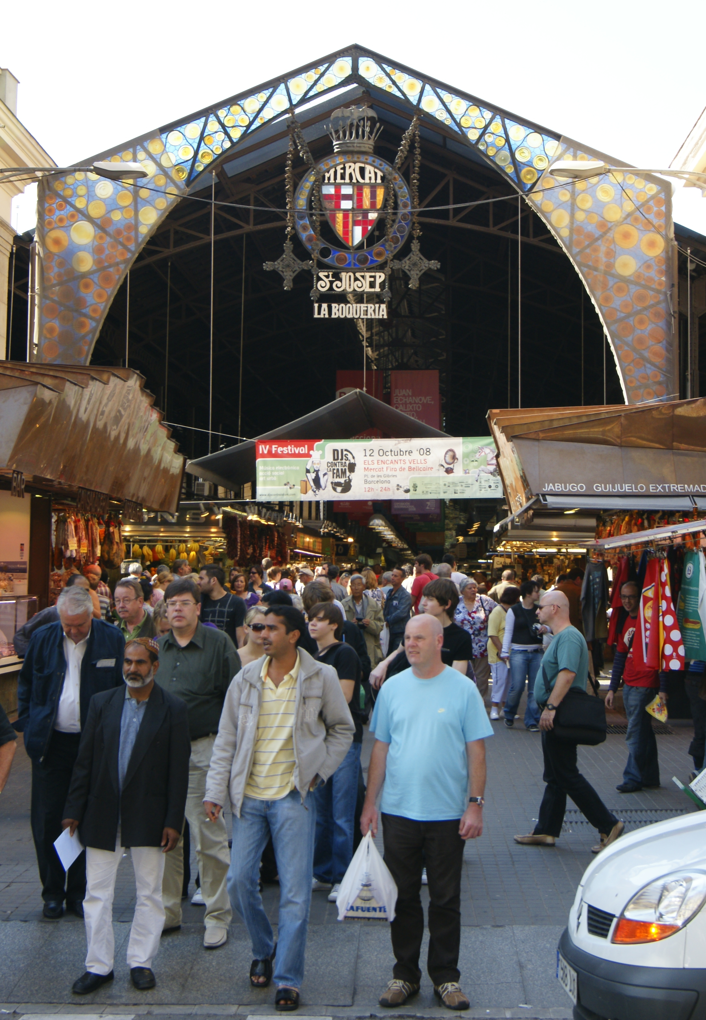 Die Markthallen des Mercat de la Boqueria liegen an der Straße La Rambla in Barcelona, Spanien und haben eine Fläche von 2.583 m².